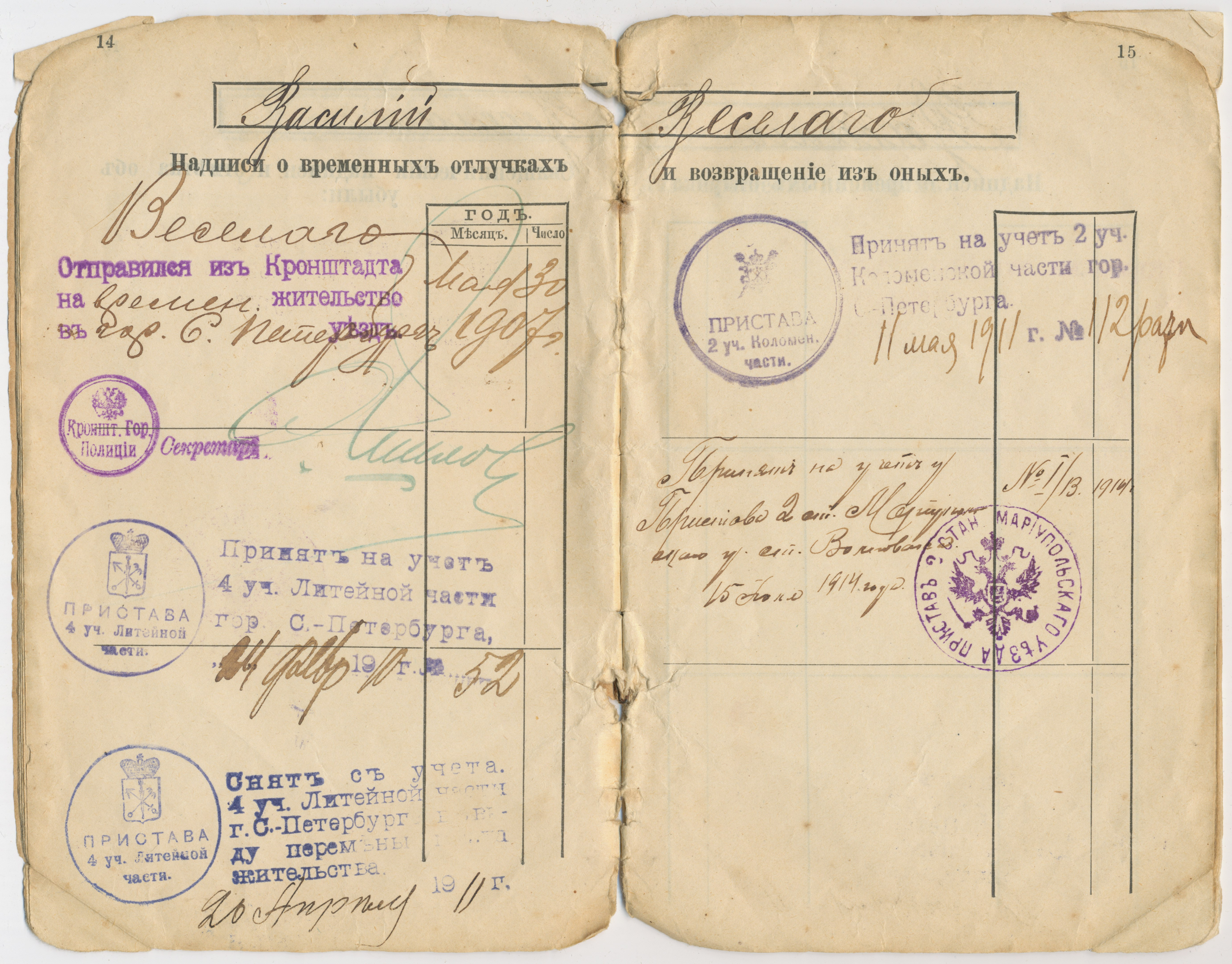 Ополченский билет № 6307 (1901 г.), стр. 14-15, Василий Сергеевич Веселаго, отметки о принятии на воинский учёт в городах Кронштадт и Санкт-Петербург, во 2-м стане Мариупольского уезда (станция Волноваха).